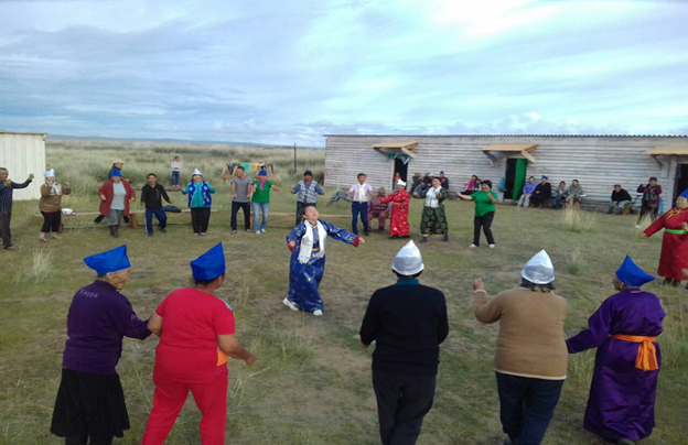 Отдыхающие участвуют в культурно-досуговой программе